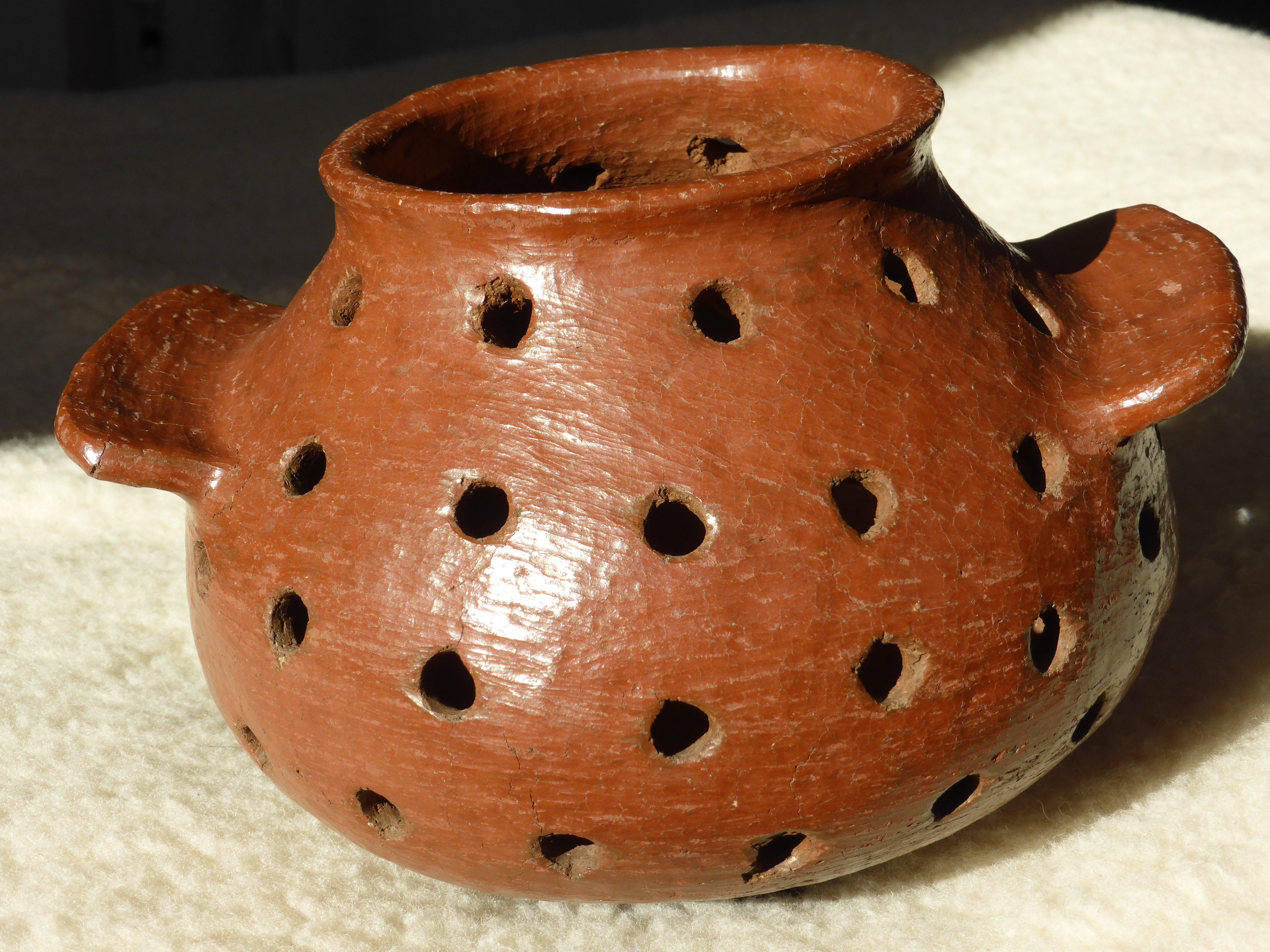 Cerámica o alfarería popular de El Cercado, Chipude, barrio del municipio de Vallehermoso, en La Gomera, islas Canarias. Esta artesanía siempre ha sido elaborada por mujeres loceras (alfareras). La pieza de la fotografía fue realizada por doña Guadalupe Niebla, en 1990. Está firmada así: "GN 1990". Aunque actualmente este modelo es de utilidad decorativa, anteriormente podía usarse como olla para asar castañas. Sin duda, es una olla castañera, según testimonio oral (en enero de 2018, en La Gomera) de Ana María, nieta de Guadalupe Niebla, que también es alfarera o locera y sigue elaborando estas piezas.